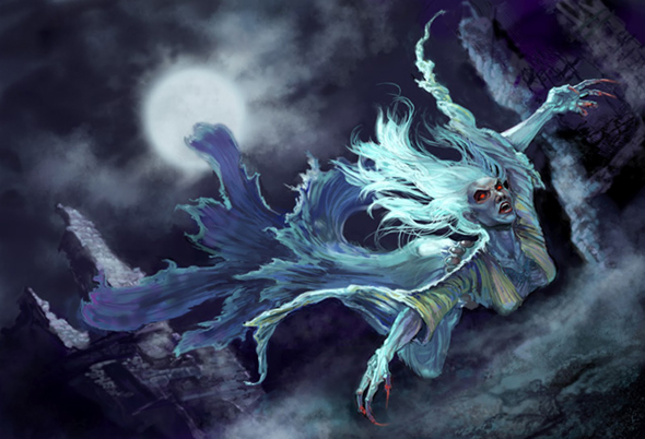 Banshee = Posol smrti